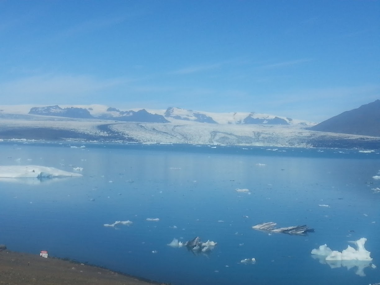 Breiðamerkurjökull